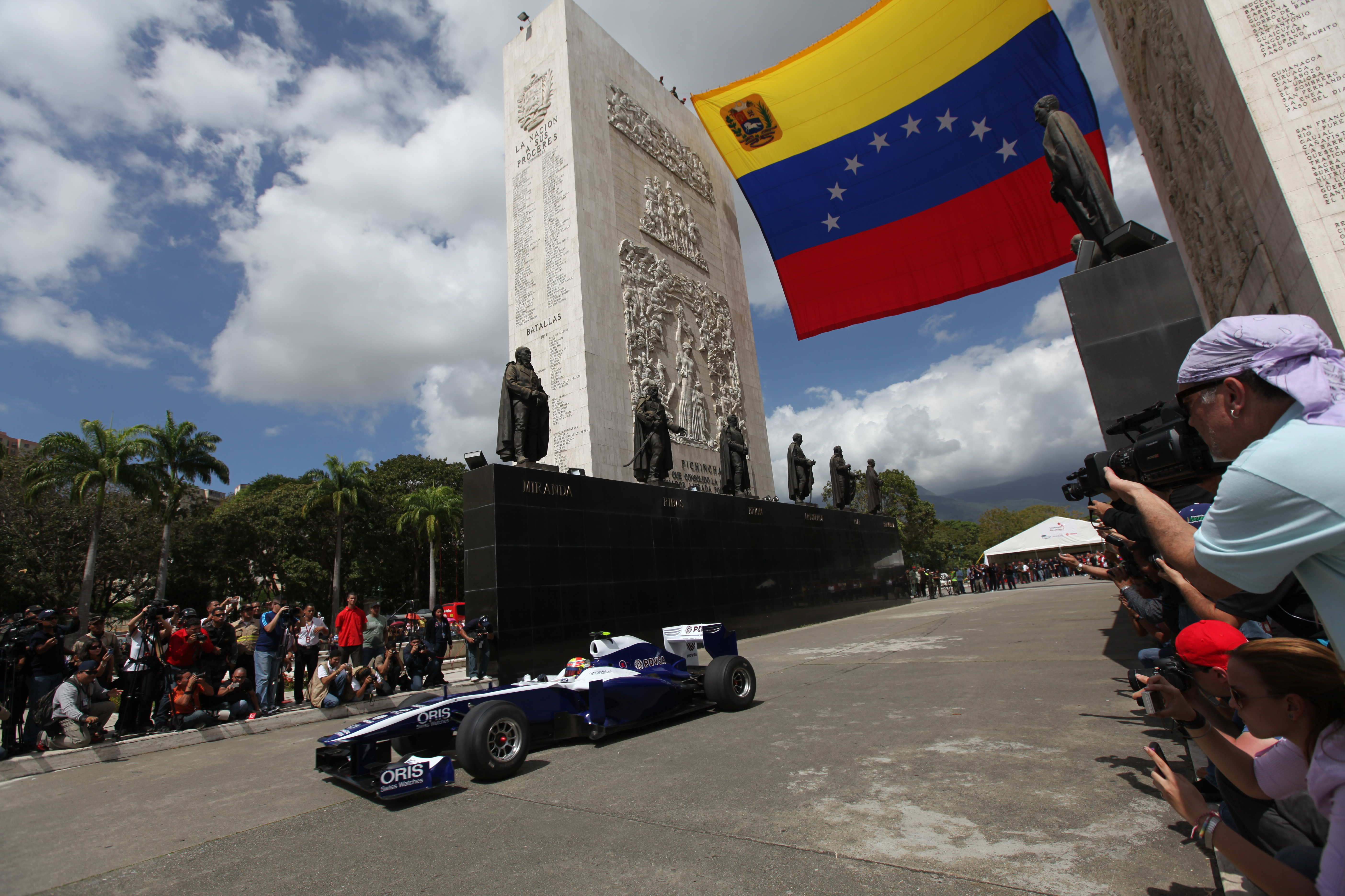 Foto: Ruthbeliz Requena